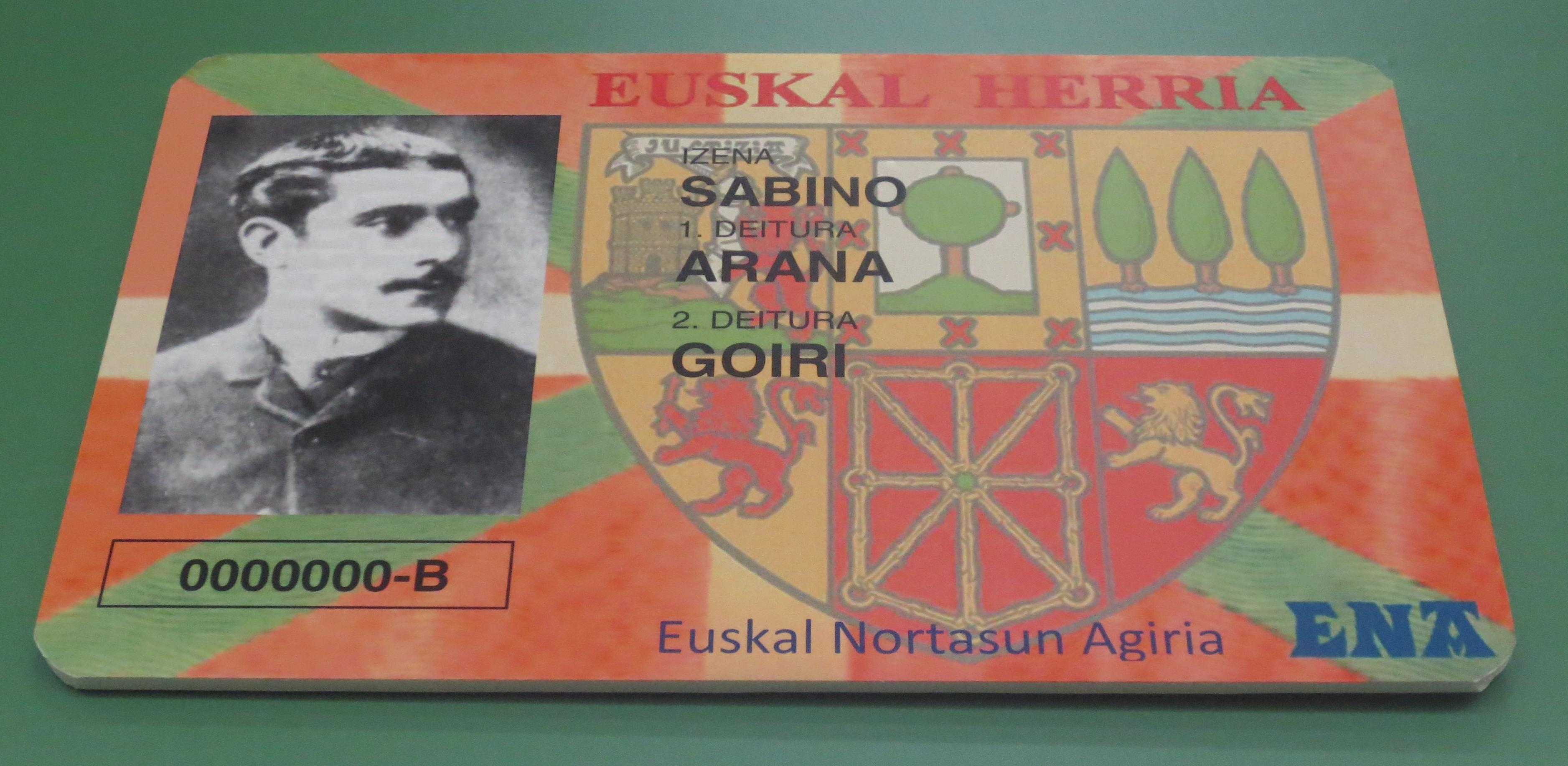 Euskal Nortasun Agiria. Adibide bat.